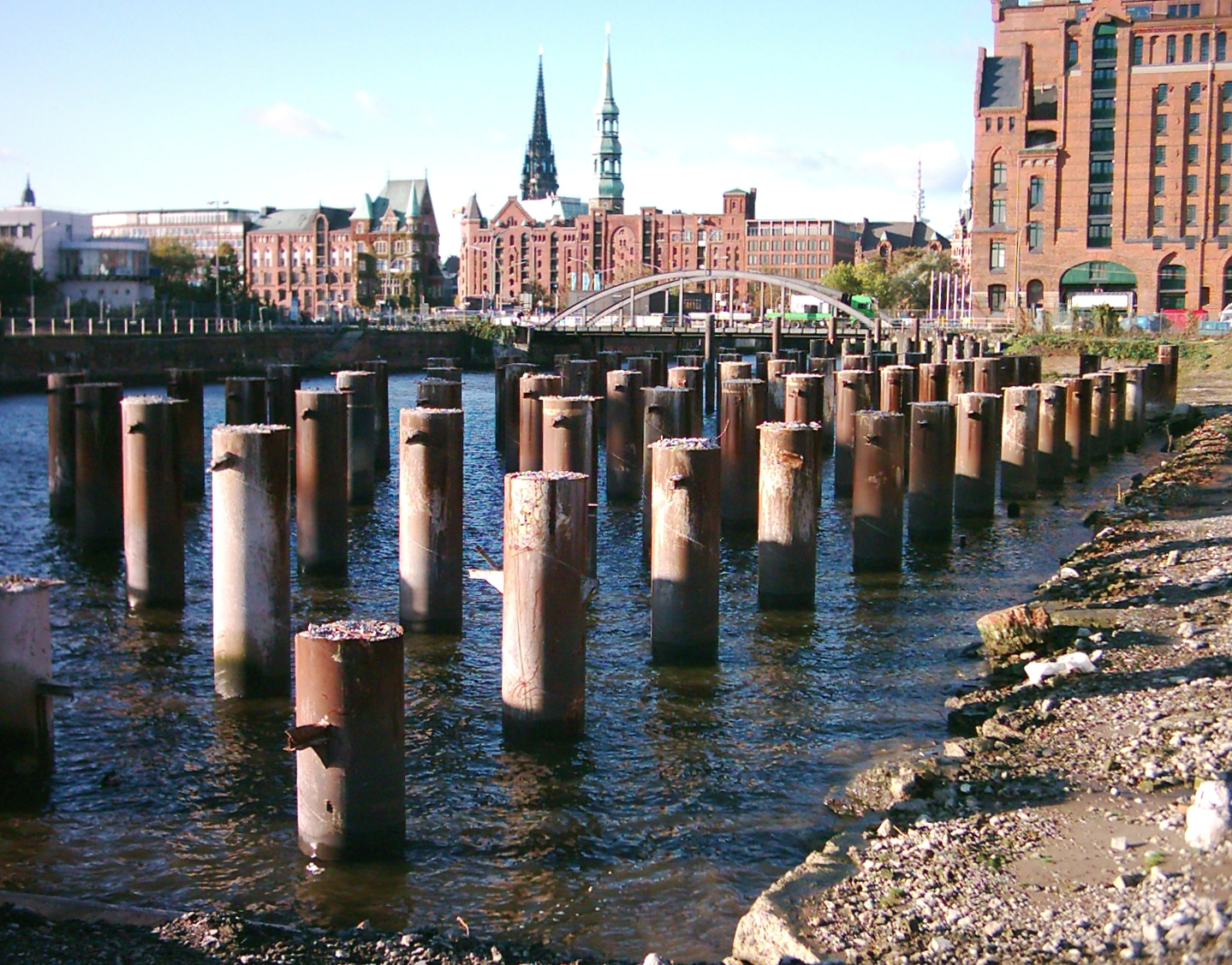 Pfähle für den Bau von Gebäuden in der HafenCity, Hamburg.